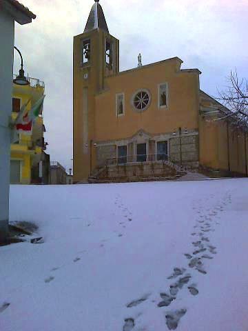 Sant'Apollinare(paese della valle dei santi) sotto la neve.